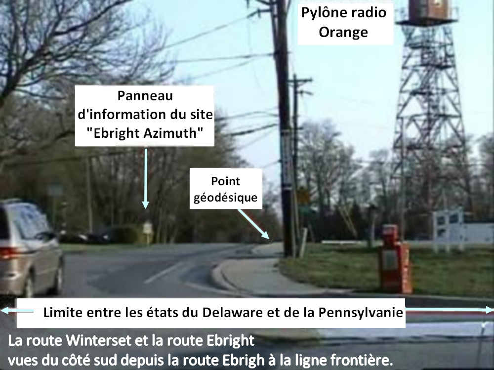 Photo annotée des environs d'Ebright Azimuth, Delaware. Illustration réalisée à partir du fichier Azimuth05.jpg